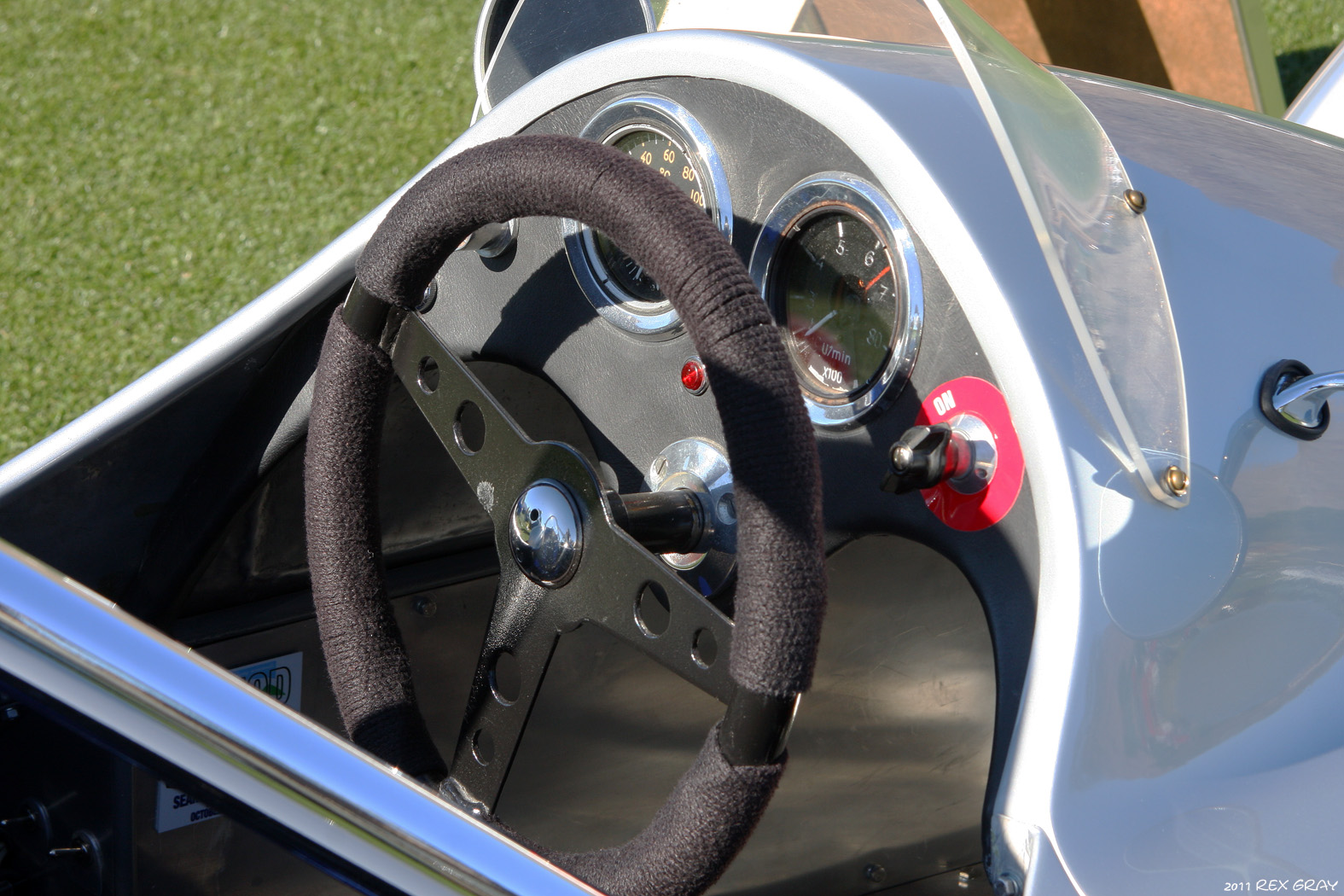 2011 Desert Classic, La Quinta, CA